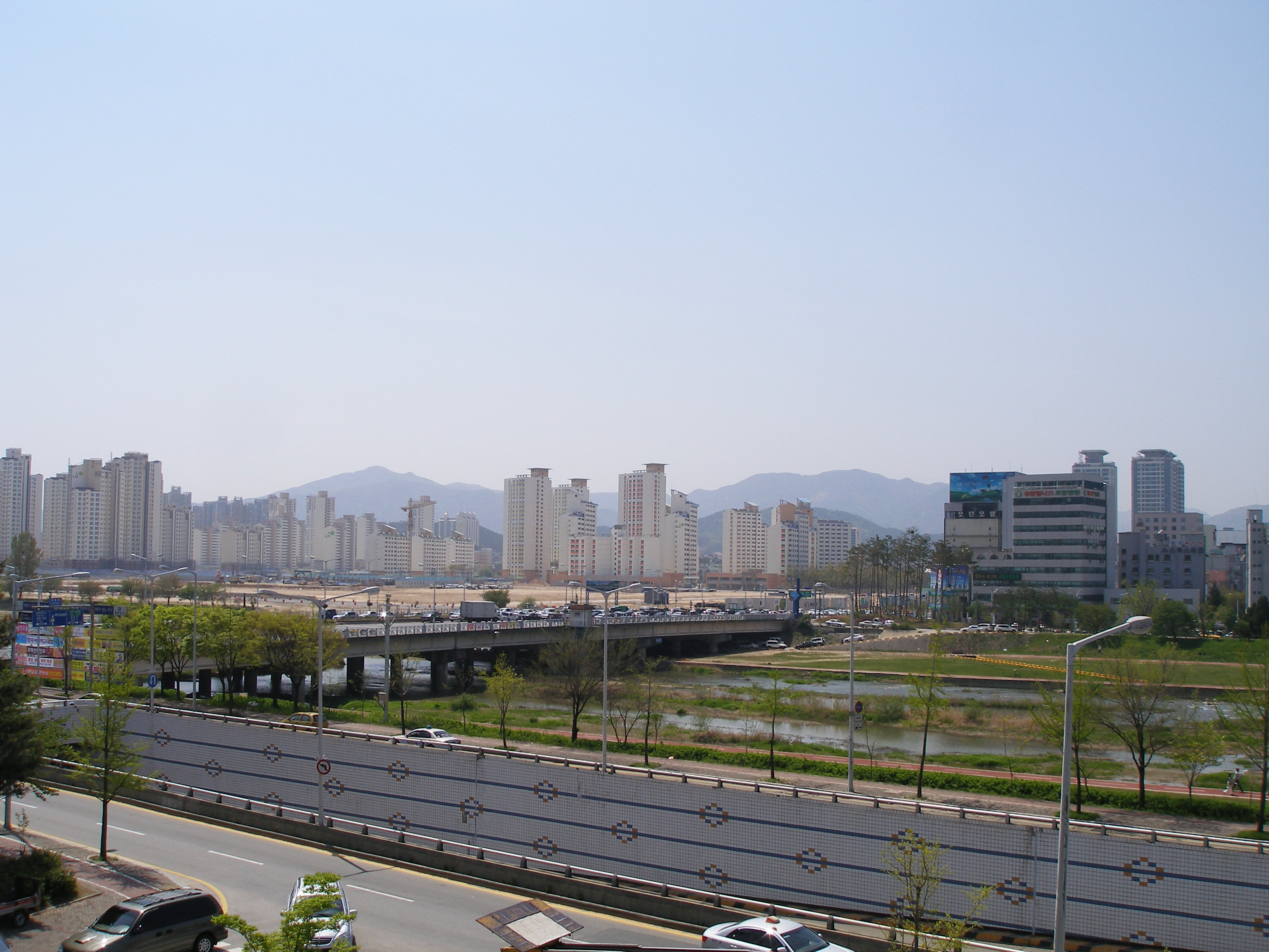 Mannyeong bridge in Daejeon, Korea